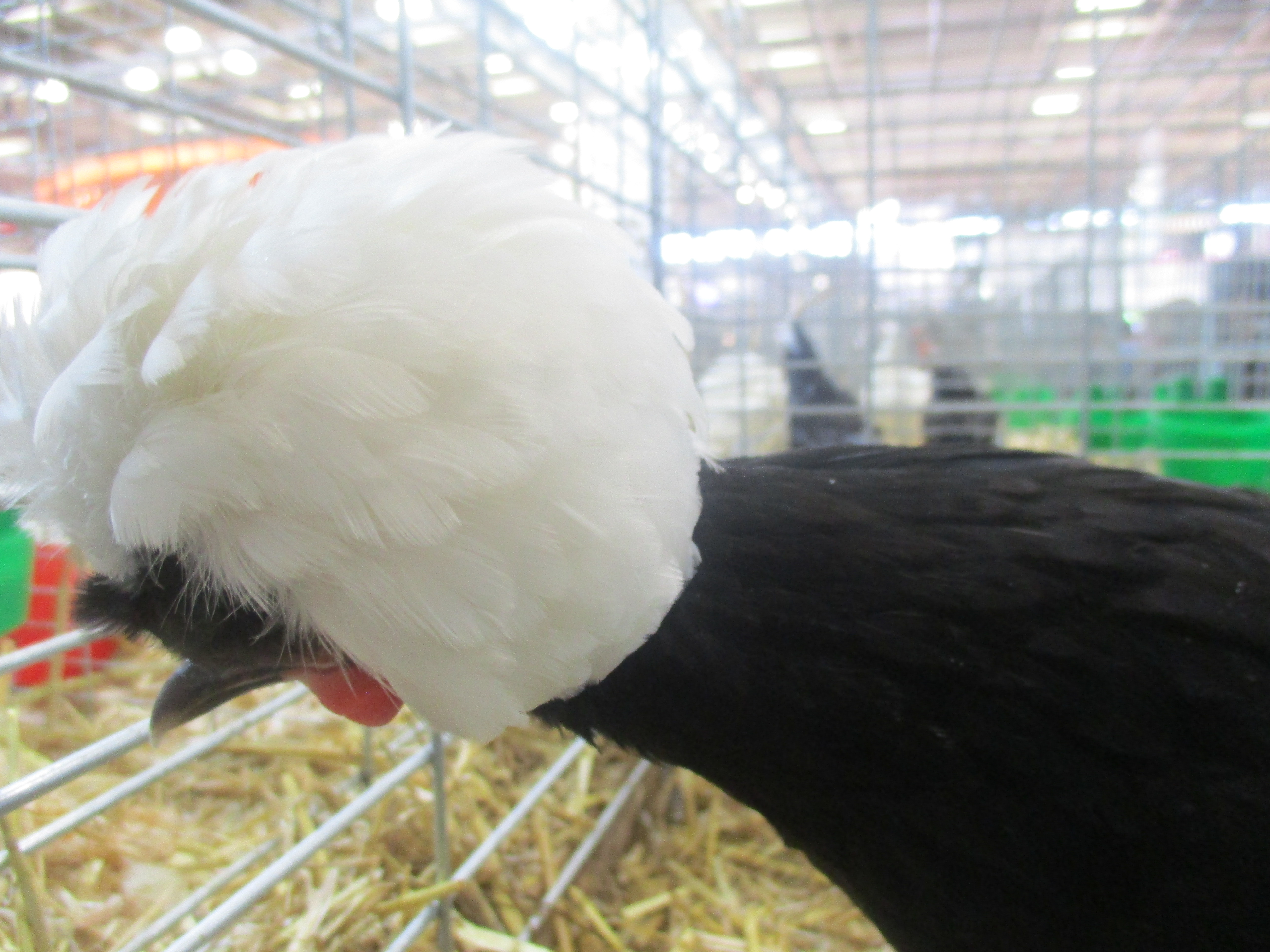 Poule hollandaise huppée. Tête.